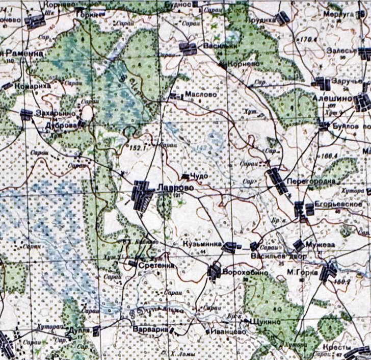 деревня Лаврово (Рамешковский район,Тверская область) на карте 1930-х годов